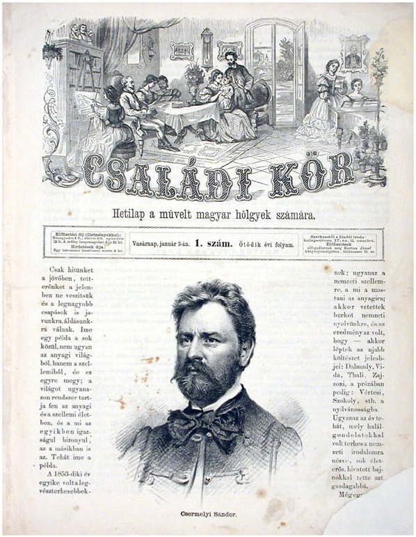 Szegfi Mórné Kánya Emília Családi Kör című irodalmi folyóiratának első száma 1860. október 14-én jelent meg, amely alcíme szerint "a művelt magyar hölgyek számára" készült.